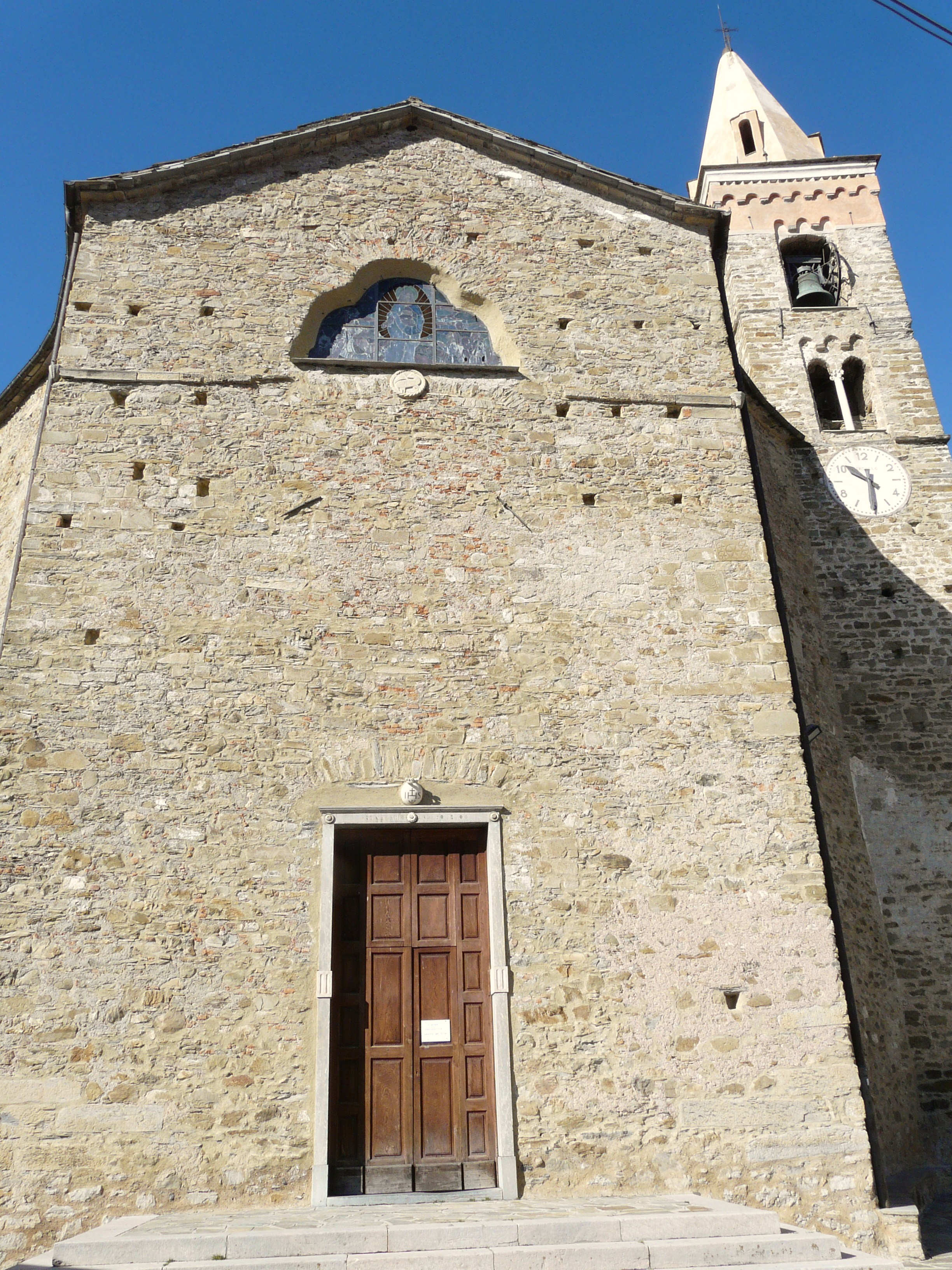 Chiesa dei Santi Nazario e Celso, Mendatica, Liguria, Italia